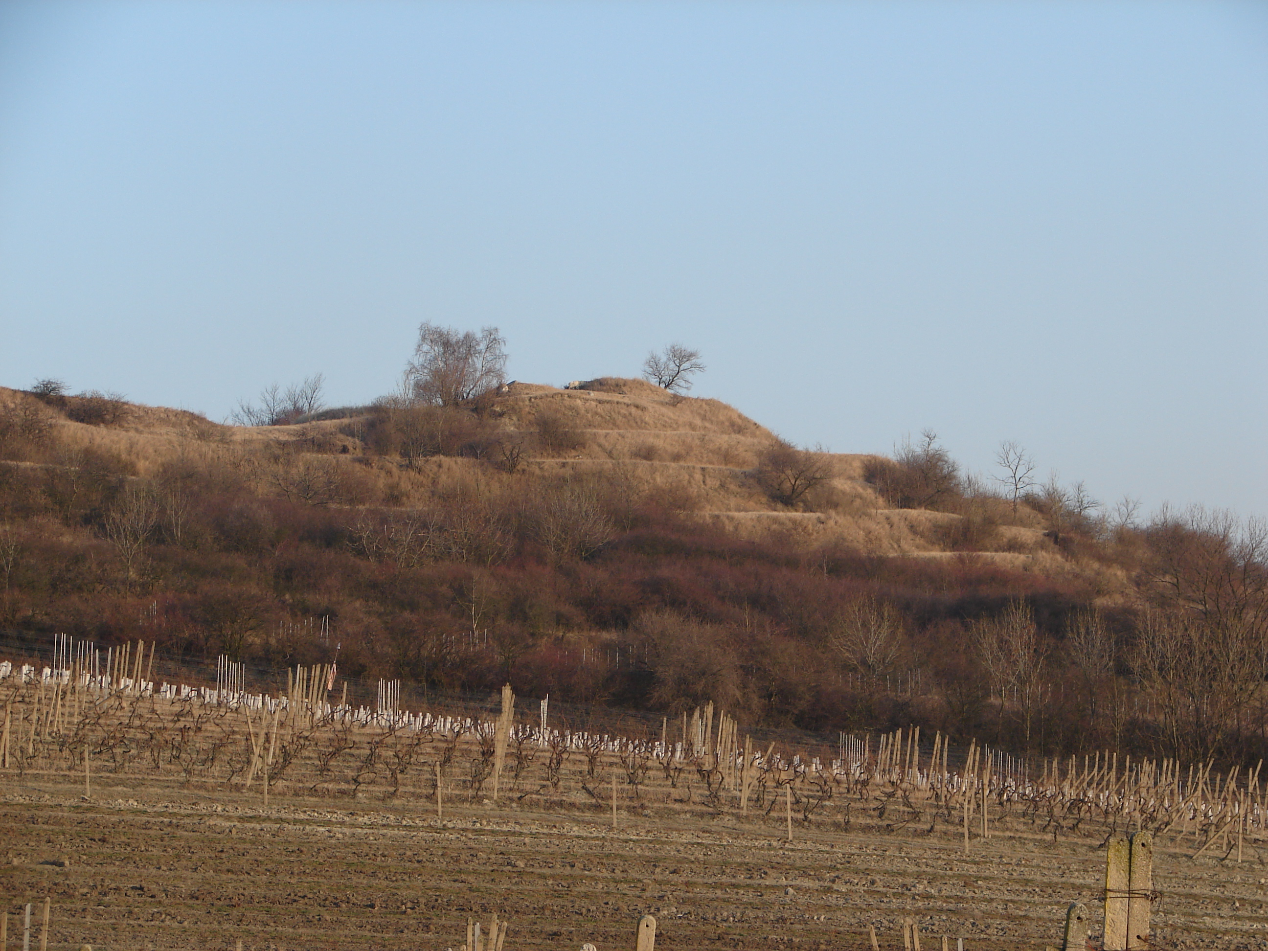 Agrární terasy, dříve spásané.